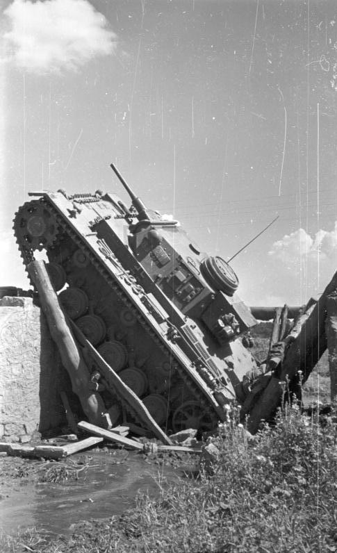 Ein Panzer brach über einer Brücke ein zw. Bug u. Dnjepr